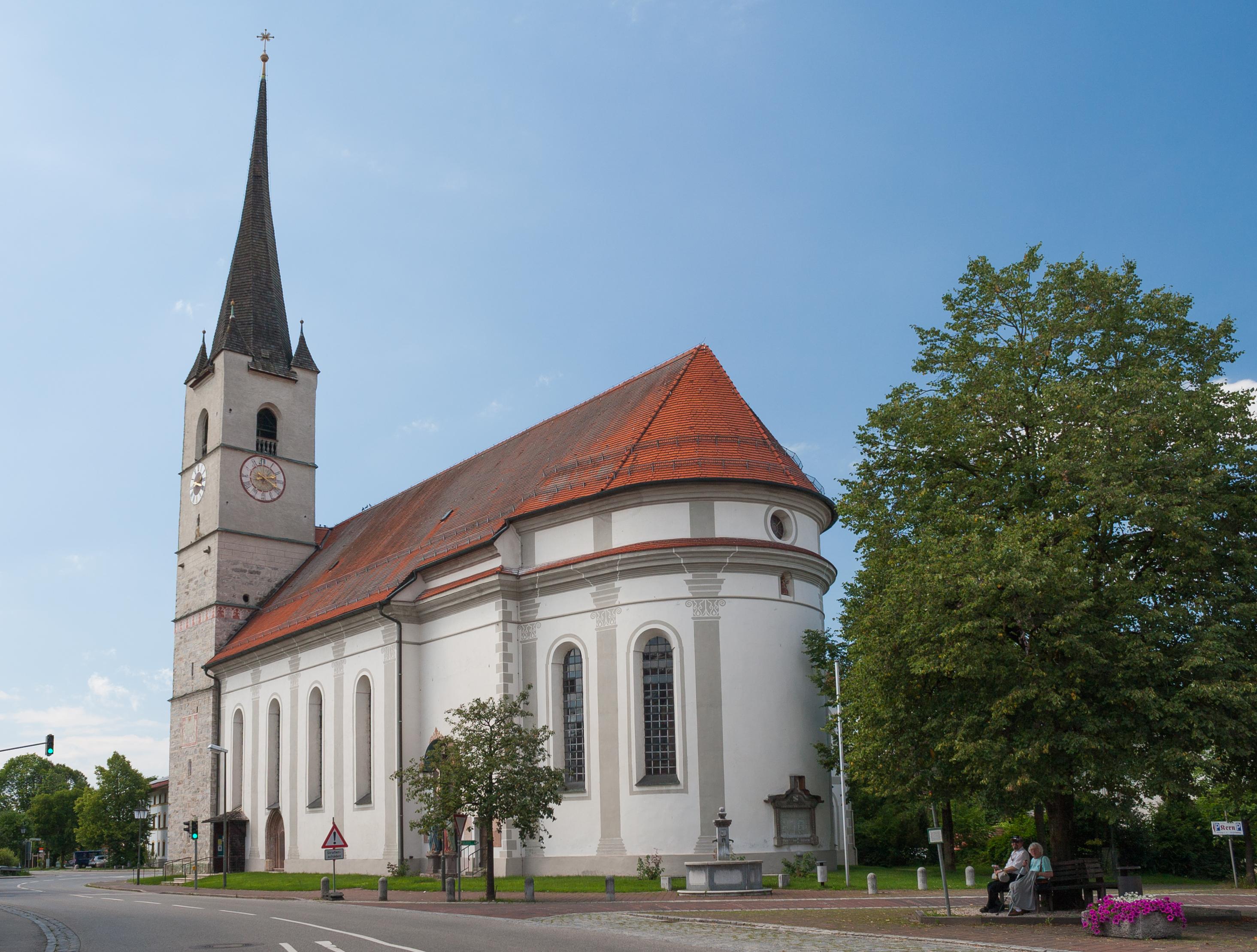 Halfing, Landkreis Rosenheim, Bavaria, Germany